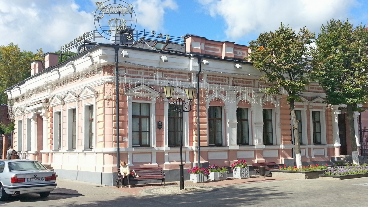 Беларуская (тарашкевіца): Гарадзкі асабняк. г. Віцебск This is a photo of Belarusian heritage monument. Reference number: 213Г000080 ( WLM)